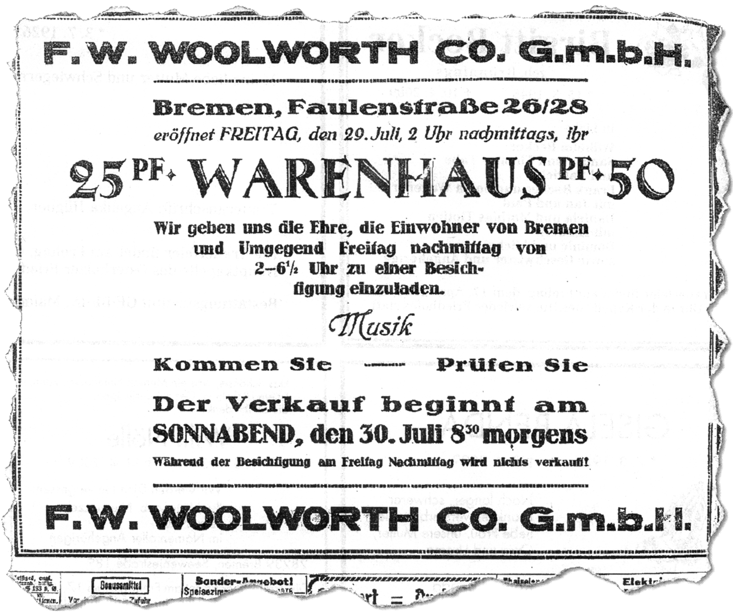 Anzeige in den Bremer Nachrichten vom 28. Juli 1927 zur Eröffnung des ersten Woolworth-Warenhauses in Deutschland